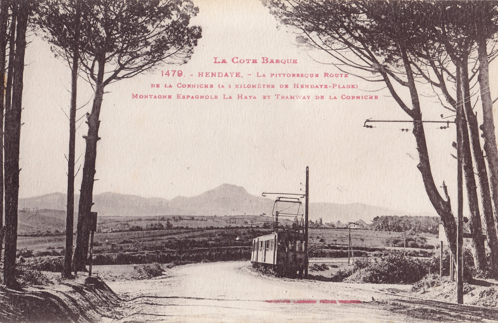 Carte postale ancienne éditée par LF, n°1479 : HENDAYE - La pittoresque route de la Corniche (à 1 km de Hendaye plage) - Montagne espagnole La Haya et tramway de la Corniche